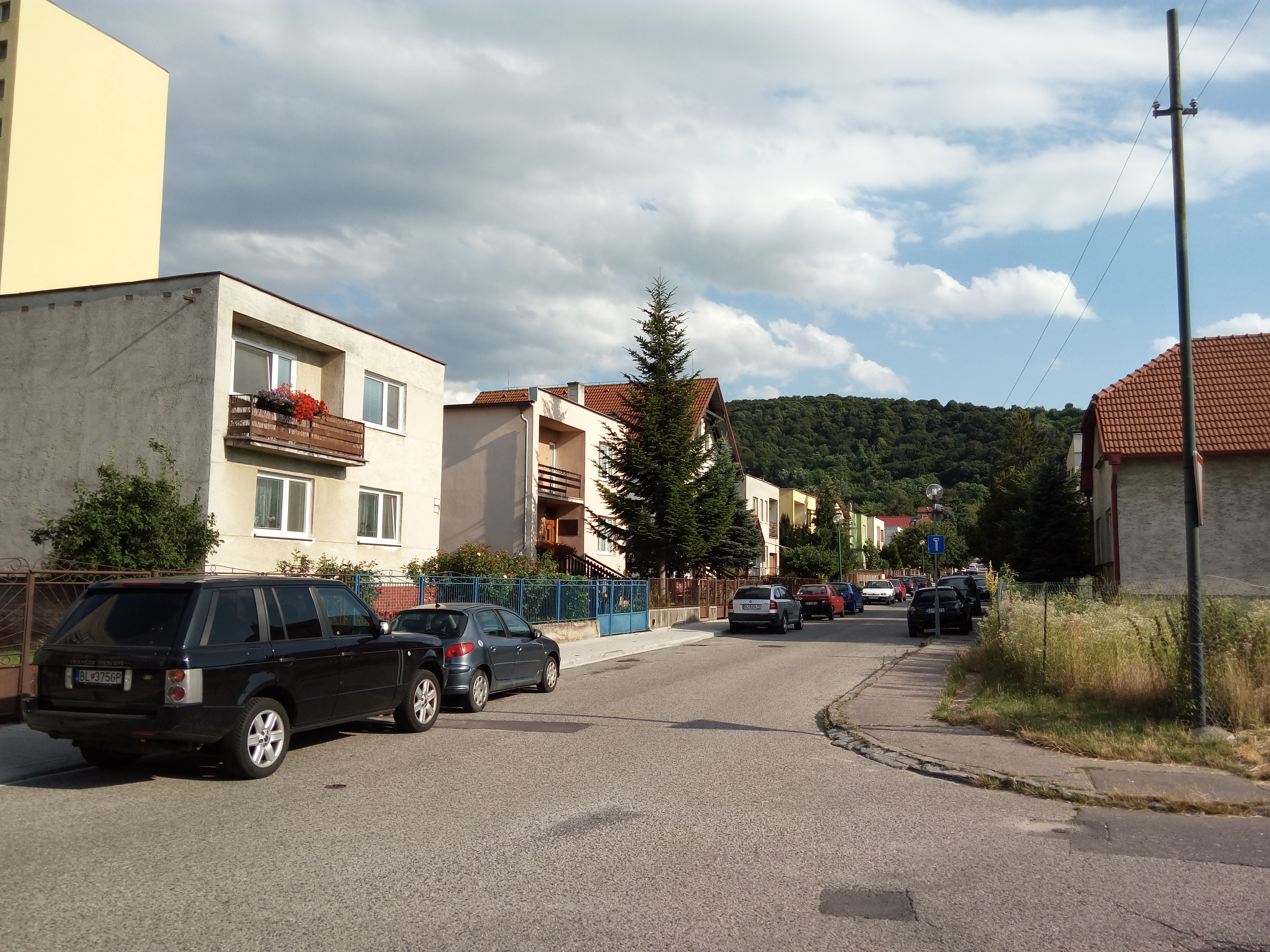 Devínska Nová Ves - Podhorské, Bratislava